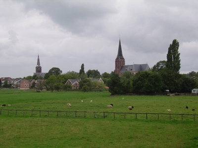 Nedersaksies: Abcoude_anzicht.jpg